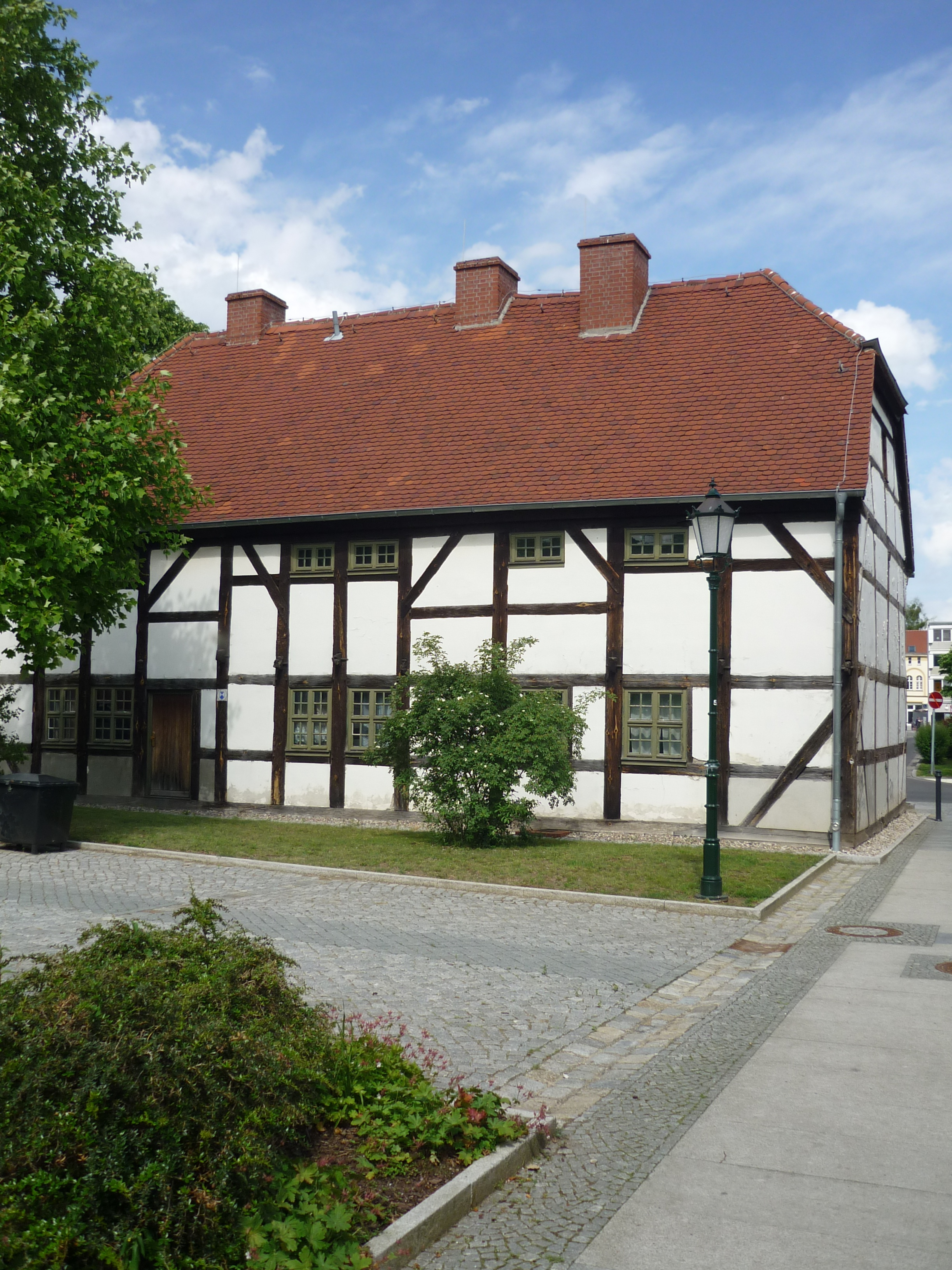 Rückseite des denkmalgeschützten Kantorhauses in Bernau bei Berlin - Fachwerk in Ständerbauweise